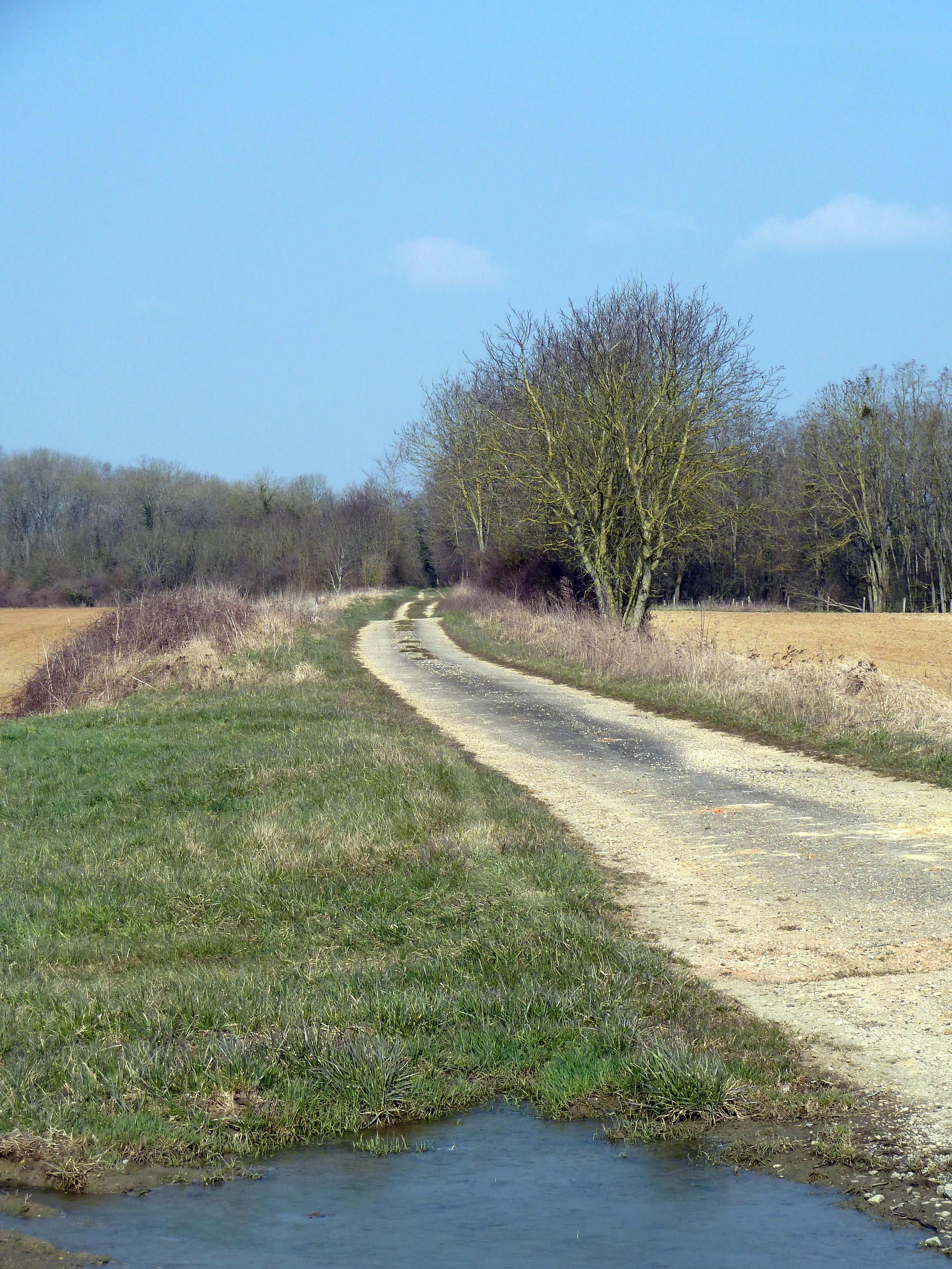 A la limite entre les communes de Laimont et Villers-aux-Vents (55 Meuse) l'ancienne voie romaine Reims Toul à l'endroit où elle rejoint l'actuelle route départementale D75.